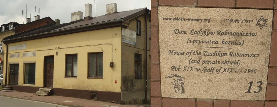 Radomsko. Otwarte Muzeum Żydowskie 13